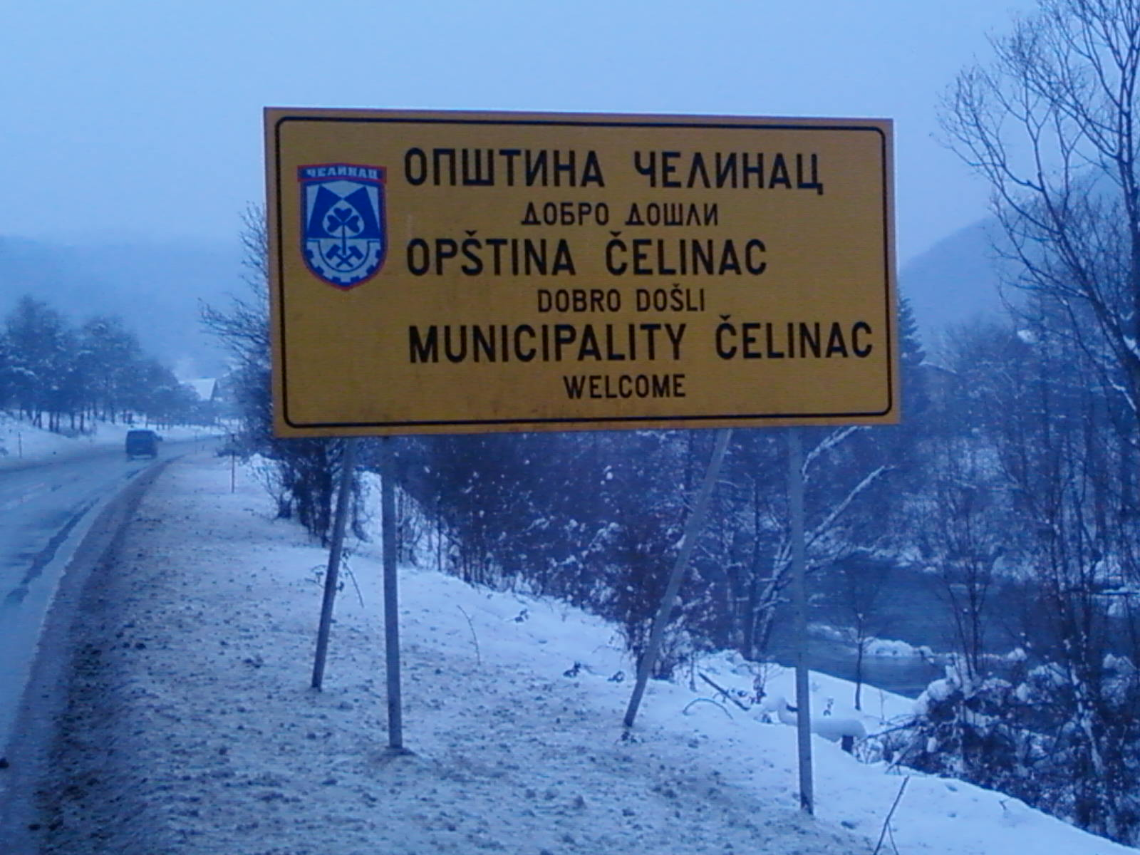 Panneau de la ville de Celinac